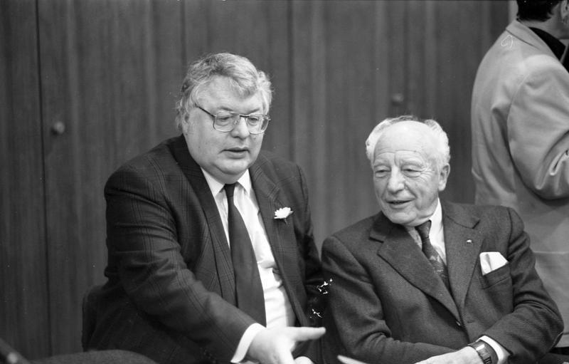 10.1.1991 Sitzung der FDP-Bundestagsfraktion im Bundeshaus (Neues Abgeordneten Hochhaus).